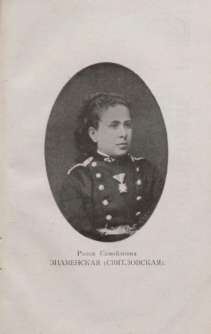 Раиса Самойловна(Самуиловна) Святловская -Знаменская (в девичестве Покрасова или Френкель)) (1849—1912) — доктор медицины, писательница.